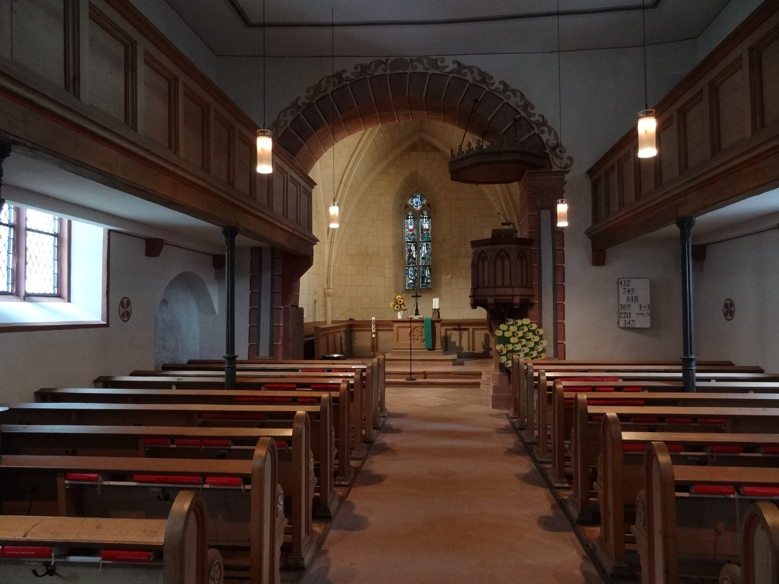 Evangelische Kirche Wieseck